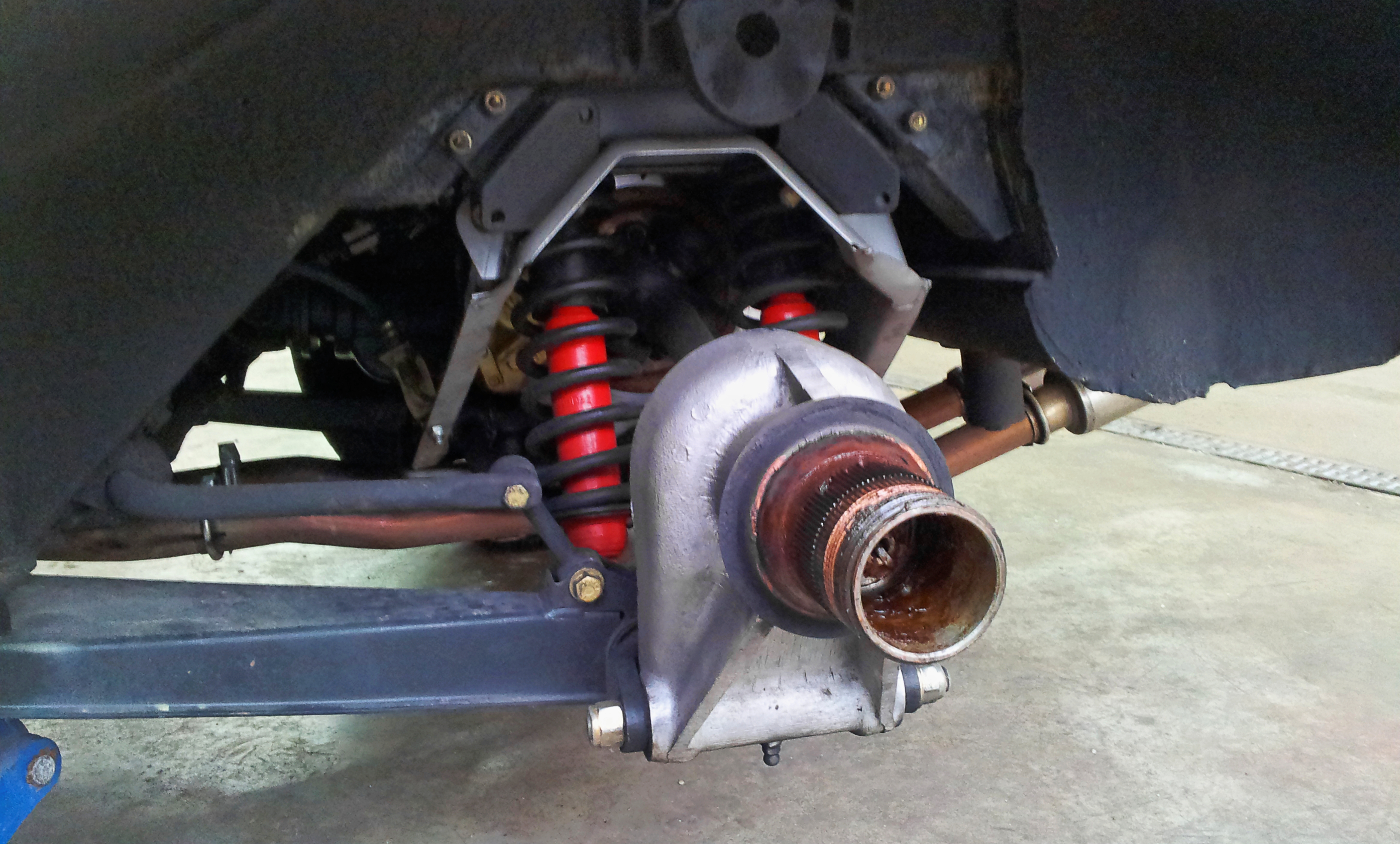 Linke Hinterachse eines Jaguar E-Type 4.2 mit Einzelradaufhängung, eigenem Hilfsrahmen, Längslenker, zwei Federbeinen, zwei Querlenker, Antriebswellen als obere Querlenker